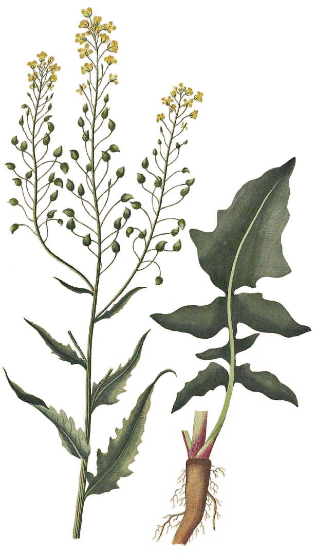 Bunias orientalis L.